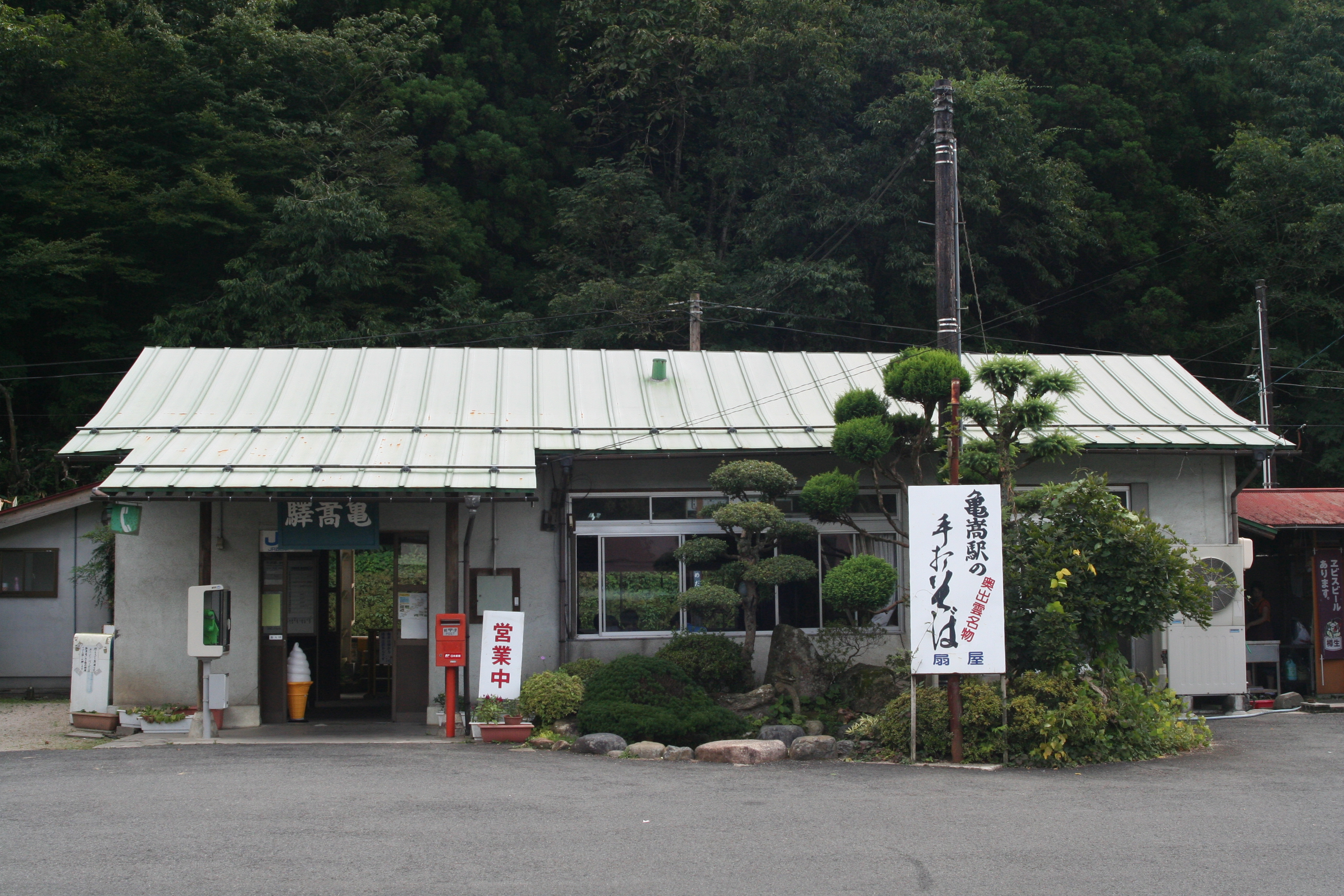 JR木次線、亀嵩駅。真正面から。